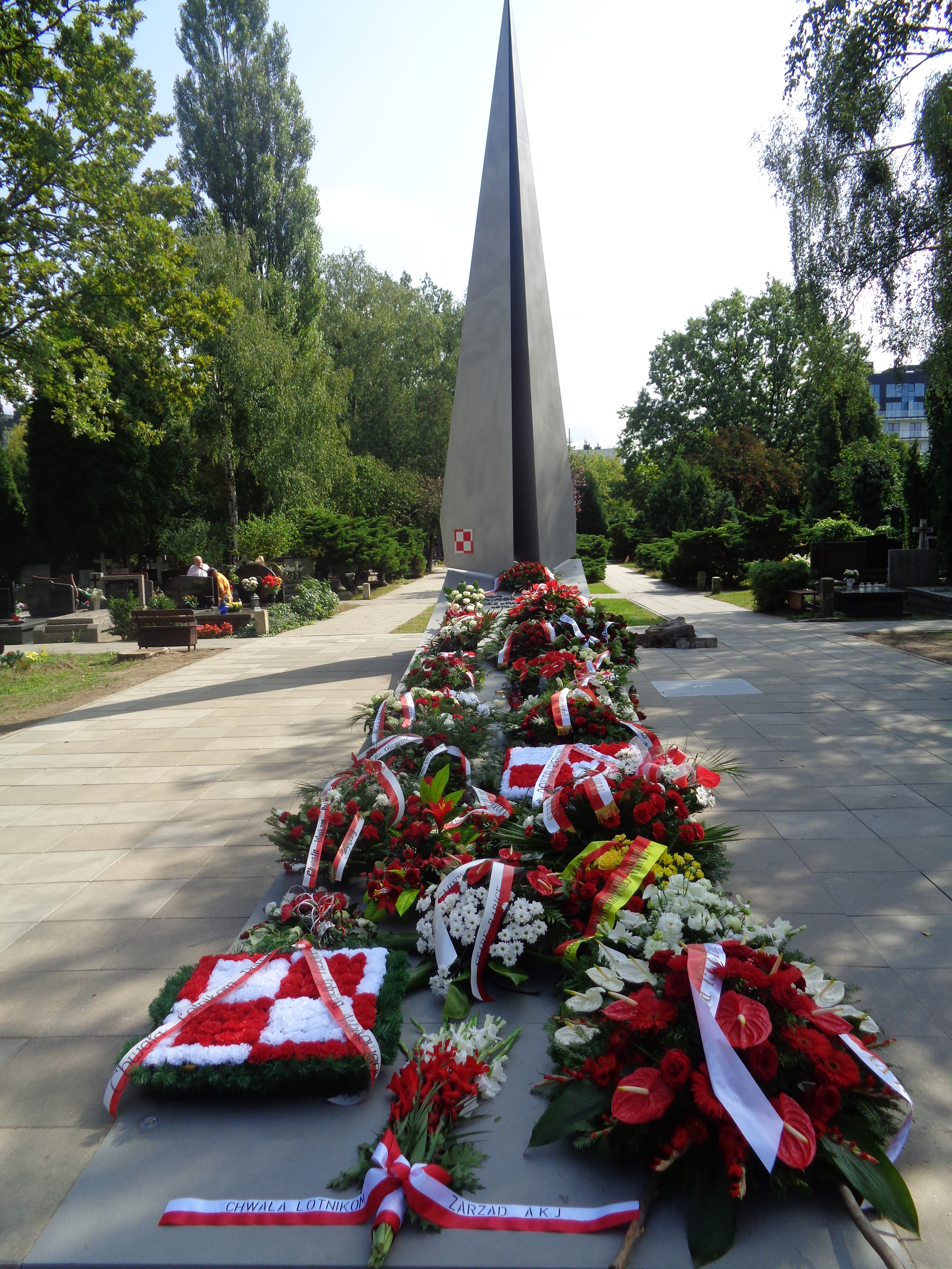 Pomnik – „Chwała Lotnikom Polskim” na Cmentarzu Wojskowym na Powązkach.